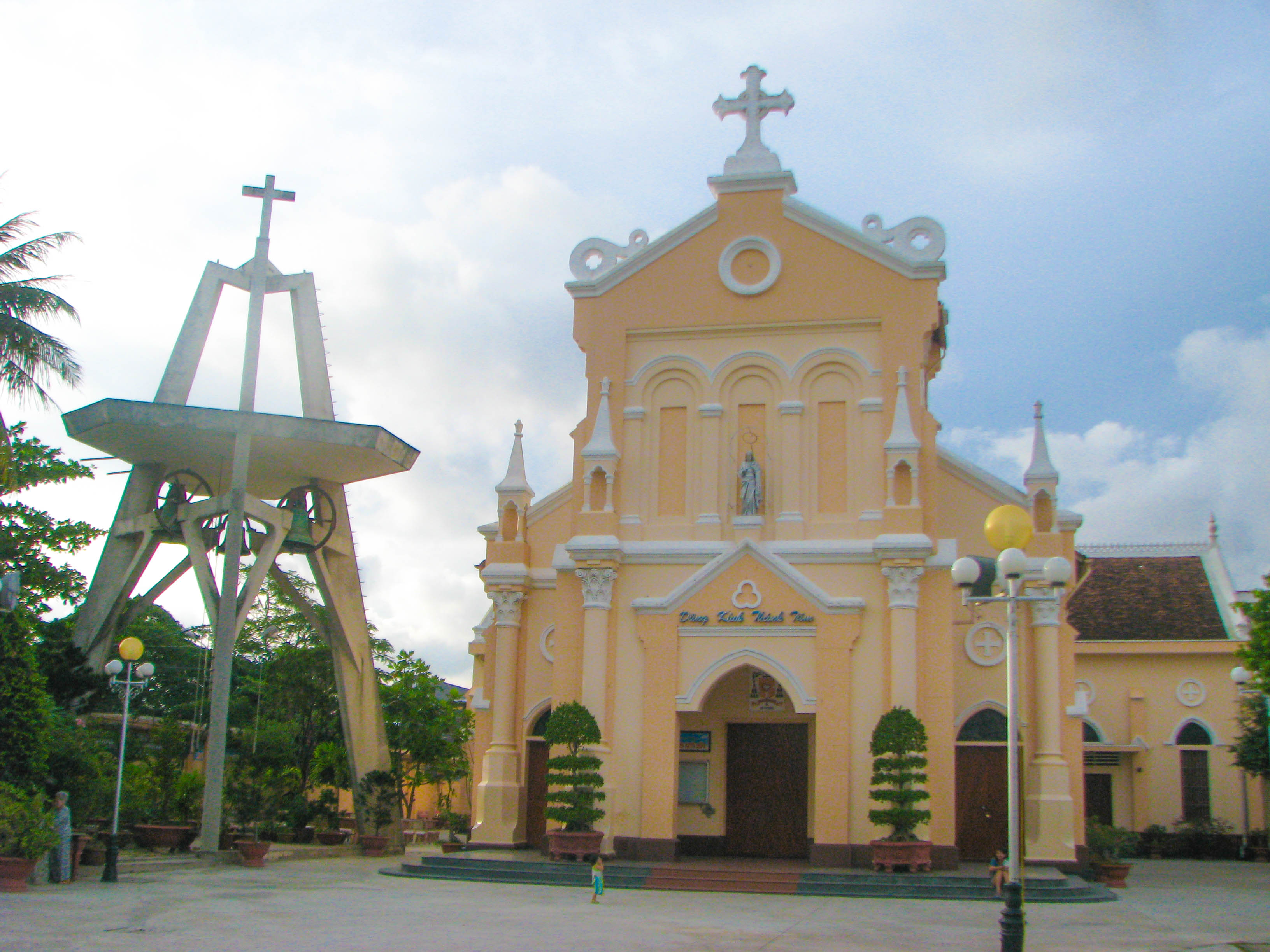 Tháp chuông và mặt tiền nhà thờ chính tòa Cần Thơ